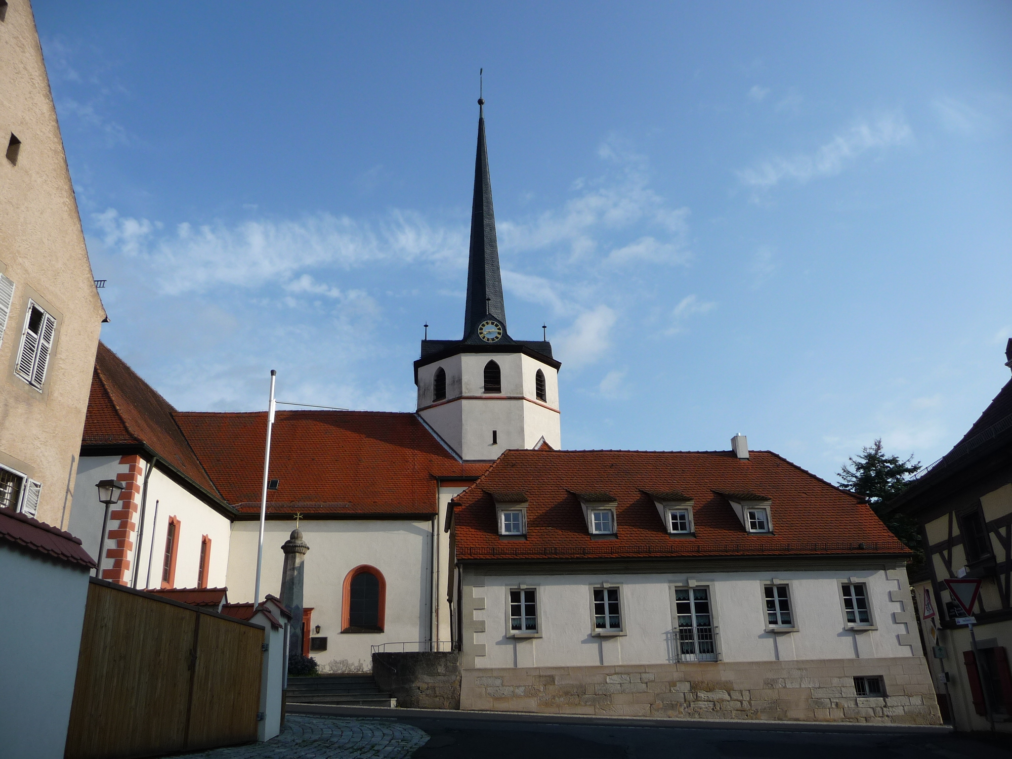 katholische Kirche St. Sebastian in Reichmannsdorf, Landkreis Bamberg, Oberfranken